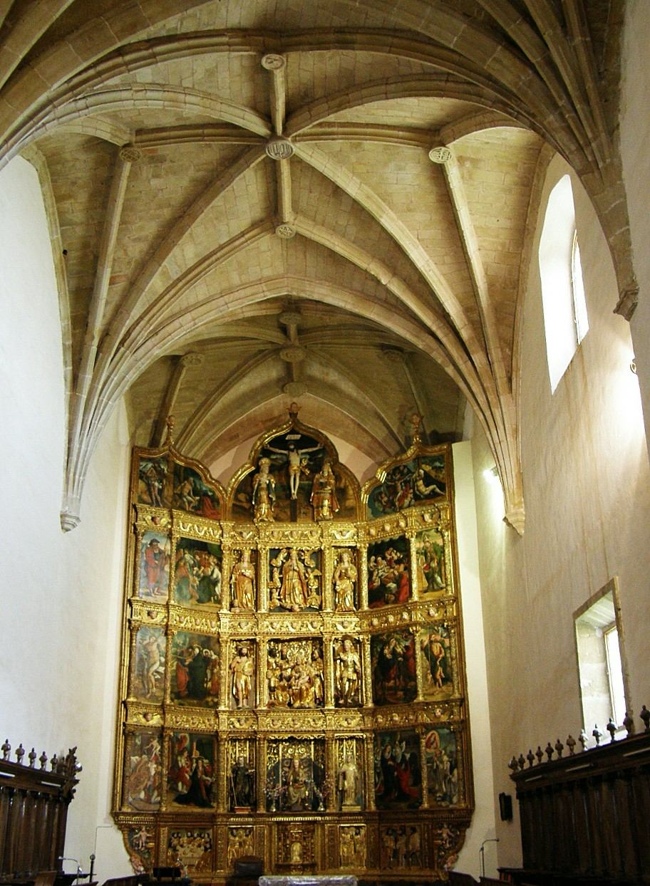 Retablo mayor plateresco del Monasterio Cisterciense de Santa María del Salvador, Cañas, La Rioja, España